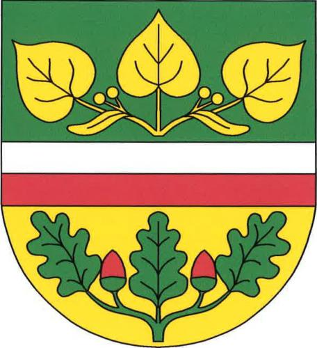 Znak obce Zeleneč v okrese Praha-východ, Česká Republika.